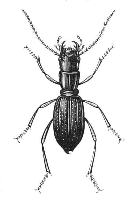 Amblycheila cylindriformis